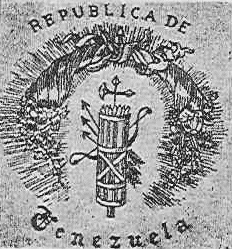 Segundo escudo provisional de Venezuela durante los años 1830 y 1836.